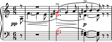 Esempio dell'"accordo di Tristano" dal Tristano e Isotta di R. Wagner